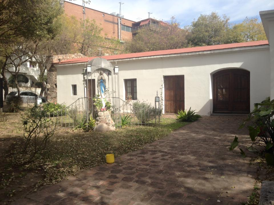 Imagen de la virgen que esta en la capilla